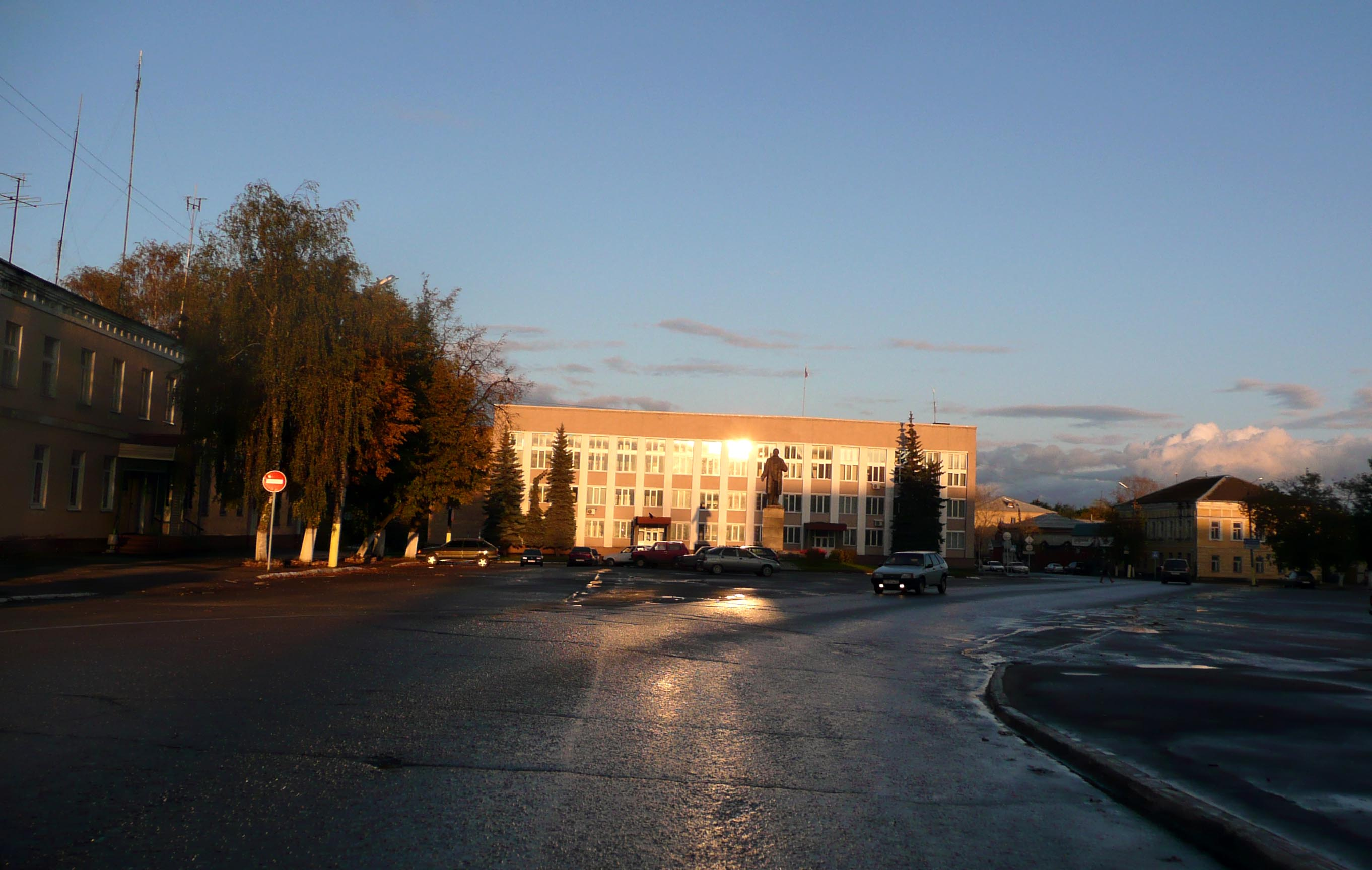 Aleksandrov, Vladimir, Russia. Sovetskaya Square, Courthouse, Lenin Estatue.